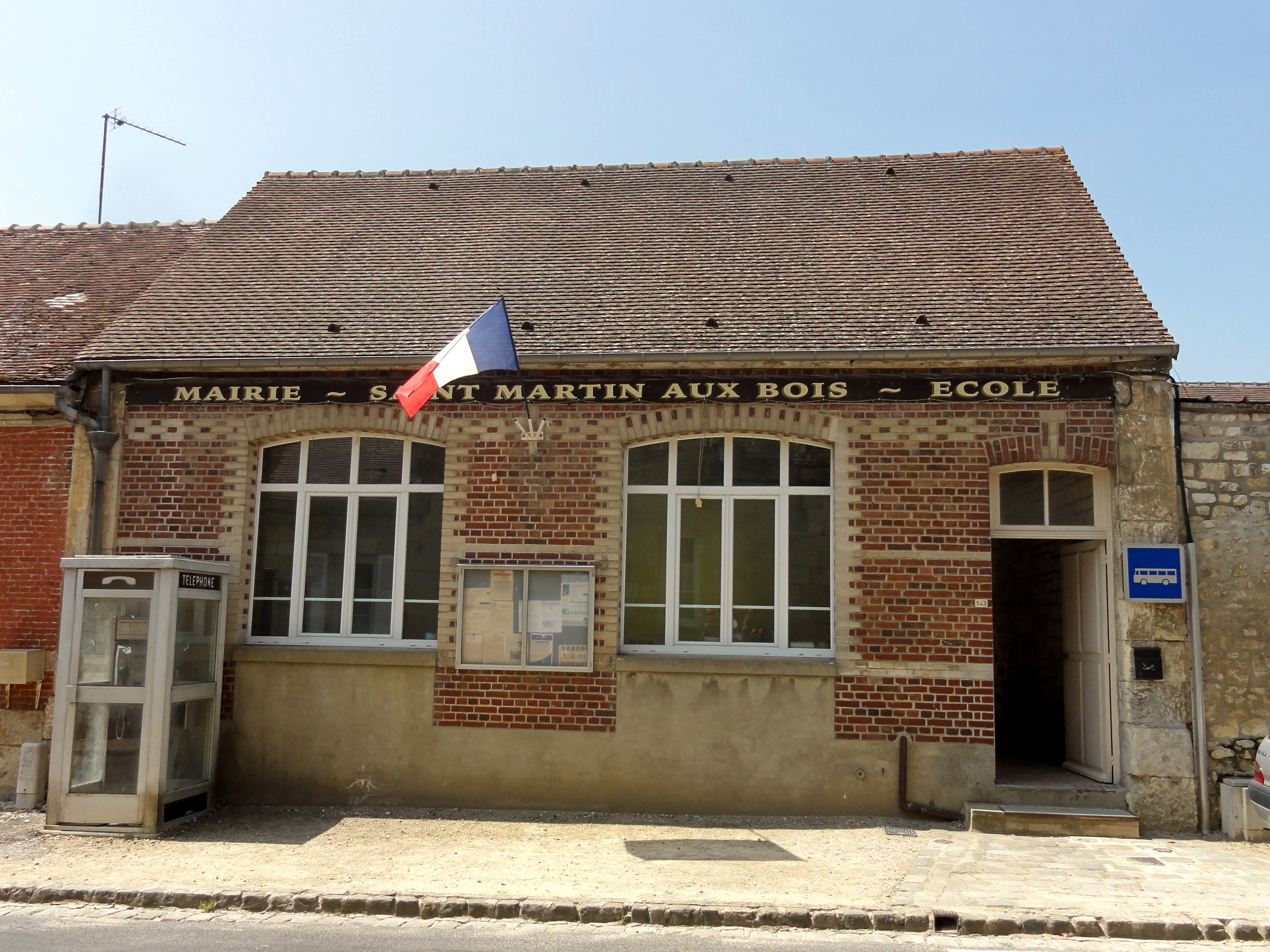 L'école communale et l'entrée de la mairie (située au fond de la cour).